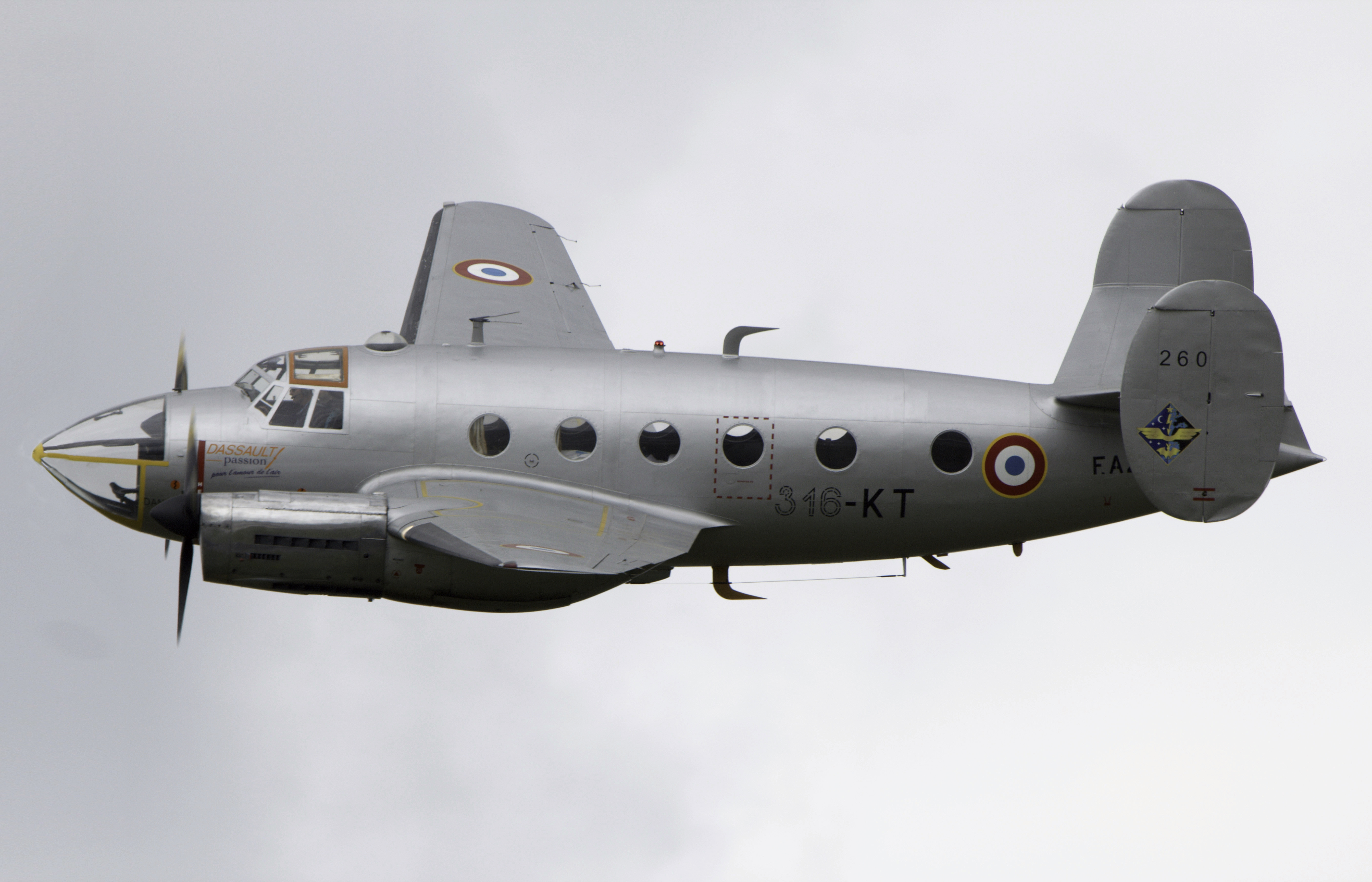 Dassault Flamant MD311 / MD312 at ILA 2010